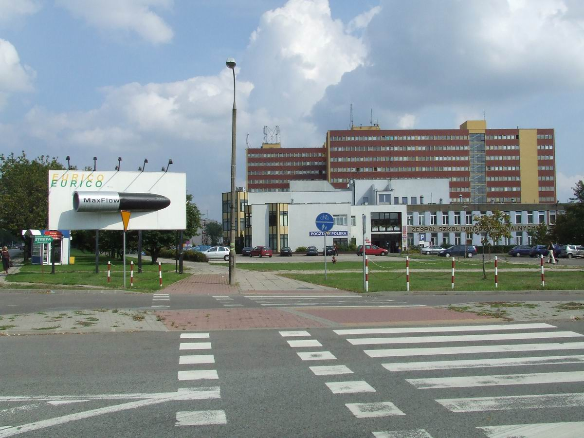 Ożarów Mazowiecki, starostwo powiatu warszawskiego zachodniego w biurowcach dawnej fabryki kabli Ożarów